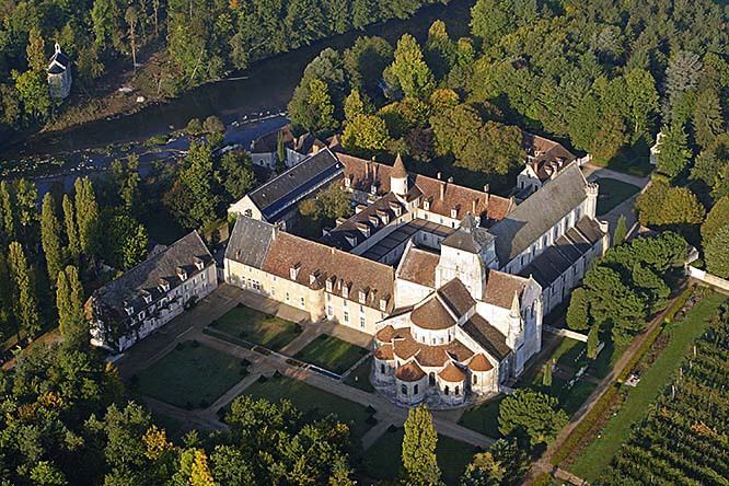 Vue aérienne oblique de l'abbaye de Fongombault (Indre)